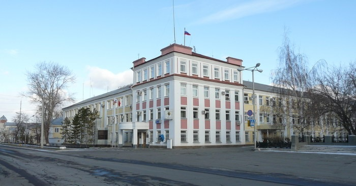 Здание администрации Копейского городского округа